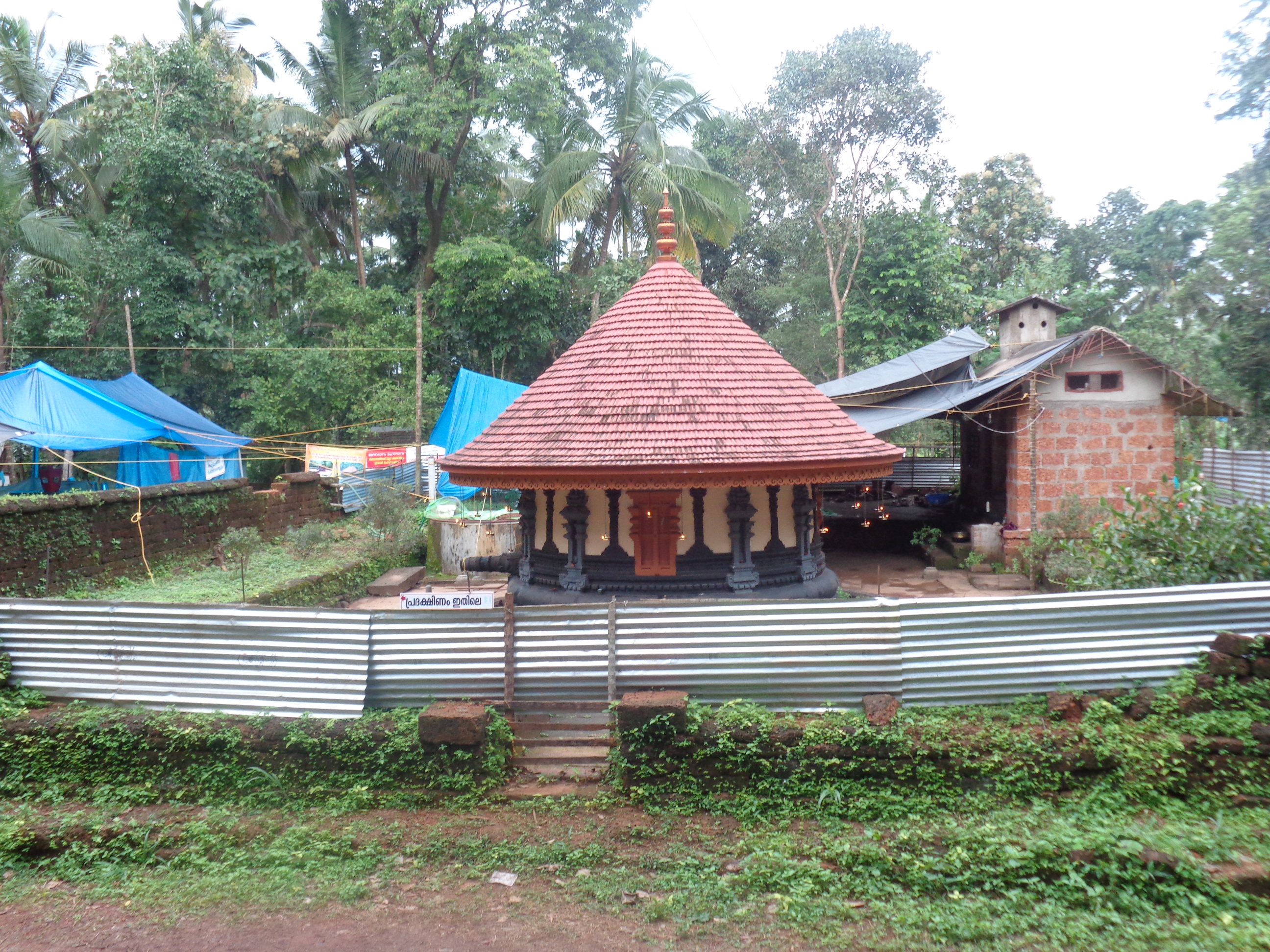 bharata temple , k